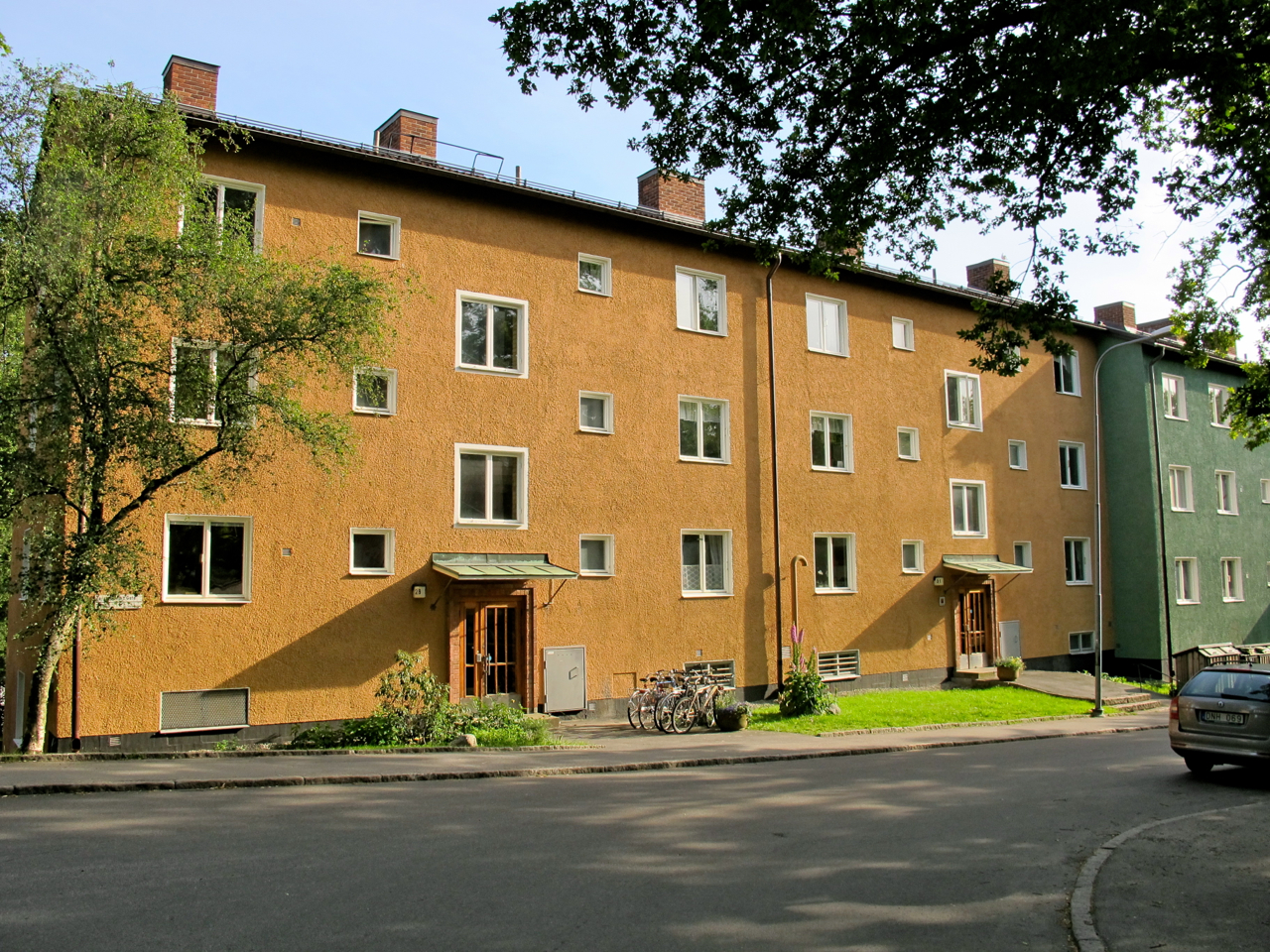 Torsten Alms gata i Aspudden i södra Stockholm